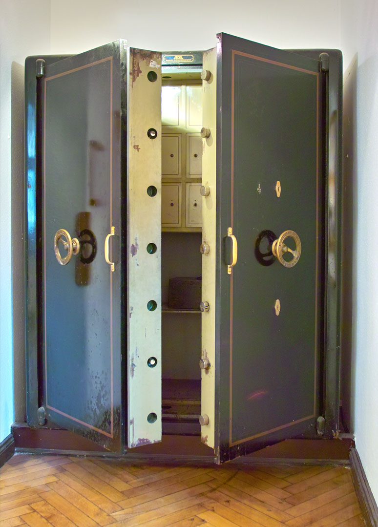 Geldschrank im Erdgeschoss des Rathauses Berlin-Köpenick